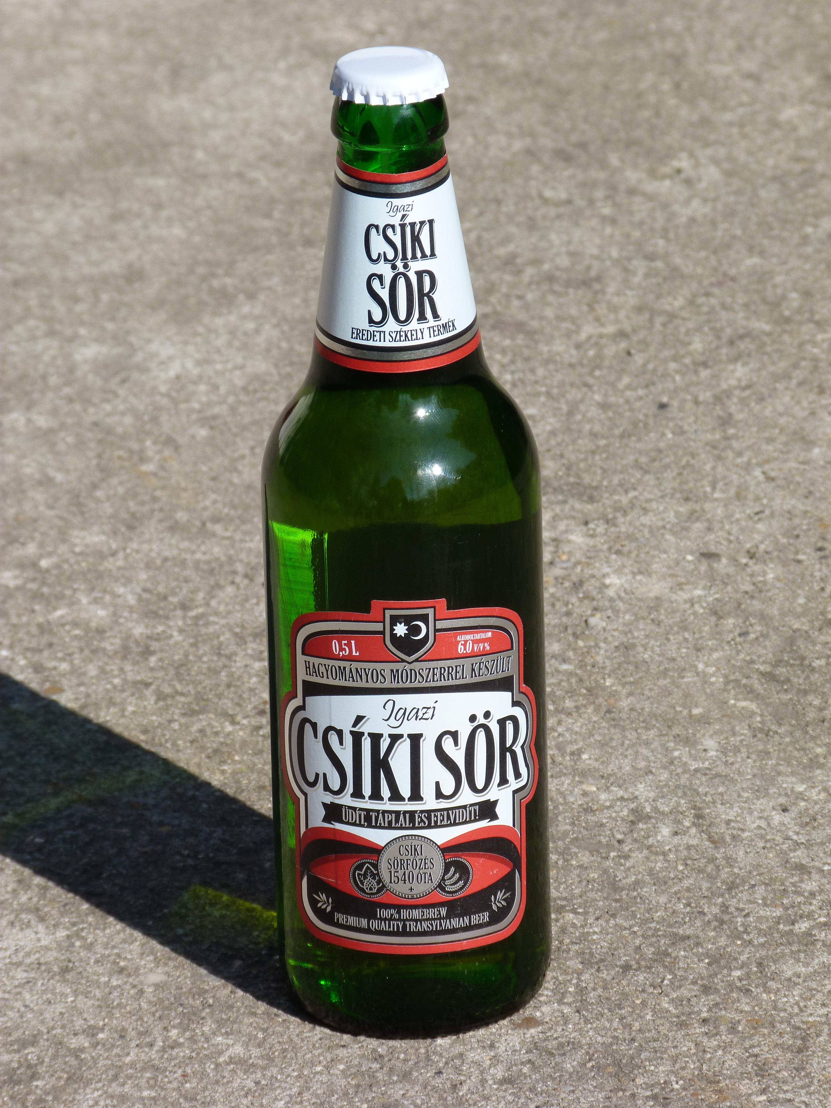 Csíki sörös üveg.